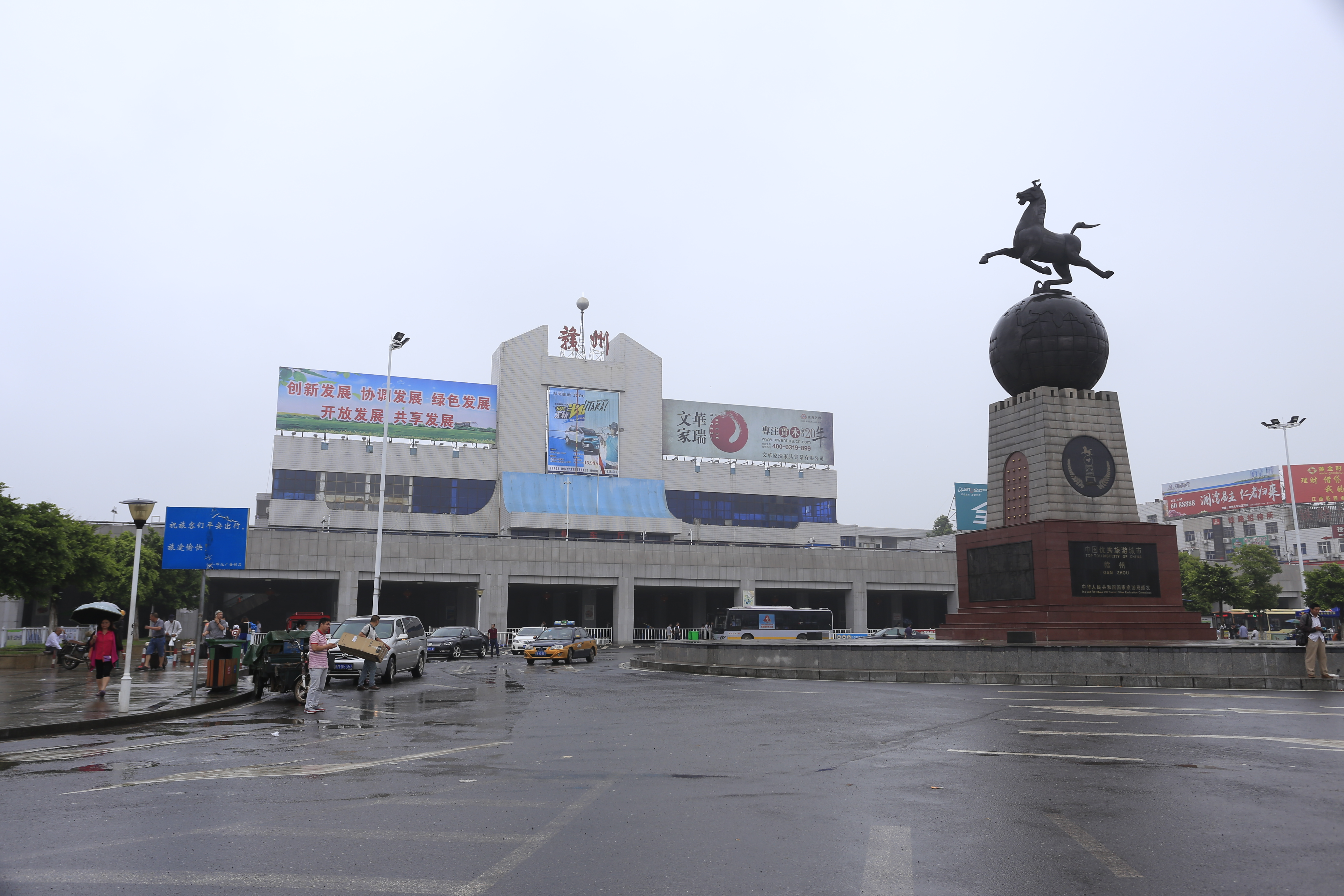 赣州火车站